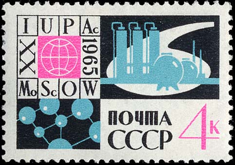 Почтовая марка СССР, выпущенная в июне 1965 года, посвящённая XX Международному конгрессу теоретической и прикладной химии в Москве. На марке изображена эмблема конгресса, газгольдеры, реторта, кристаллическая решетка вещества. Слова IUPAC и Moscow на эмблеме конгресса записаны символами химических элементов. Художник — И. Левин. Номер (ЦФА) — 3218. Тираж — 4 млн экз.